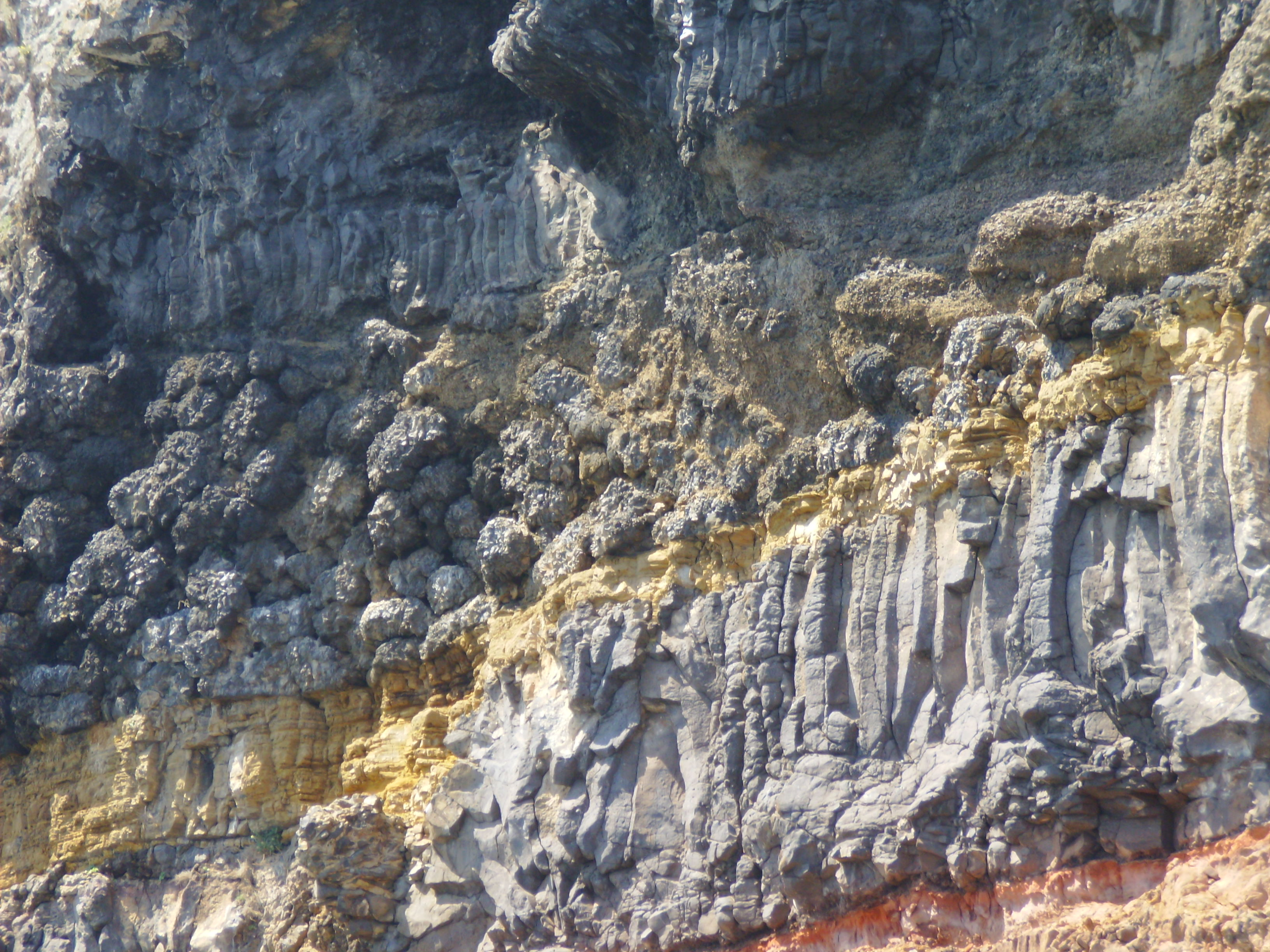 Formação geológica da Ilha de Santa Maria (Açores), Portugal: lavas em almofada e disjunção prismática (basalto). As primeiras indicam uma antiga erupção vulcânica submarina.